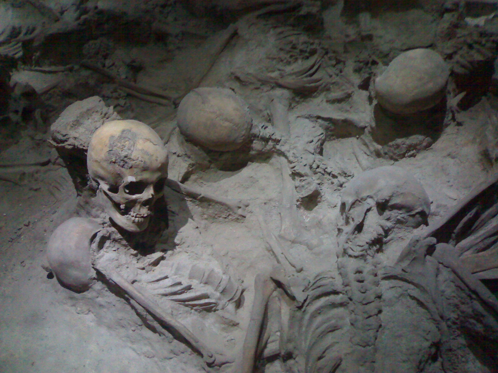 Autore e fonte: Roberto Fogliardi Descrizione: dettaglio del calco degli scheletri rinvenuti presso il porto di ercolano (museo archeologico di Napoli)